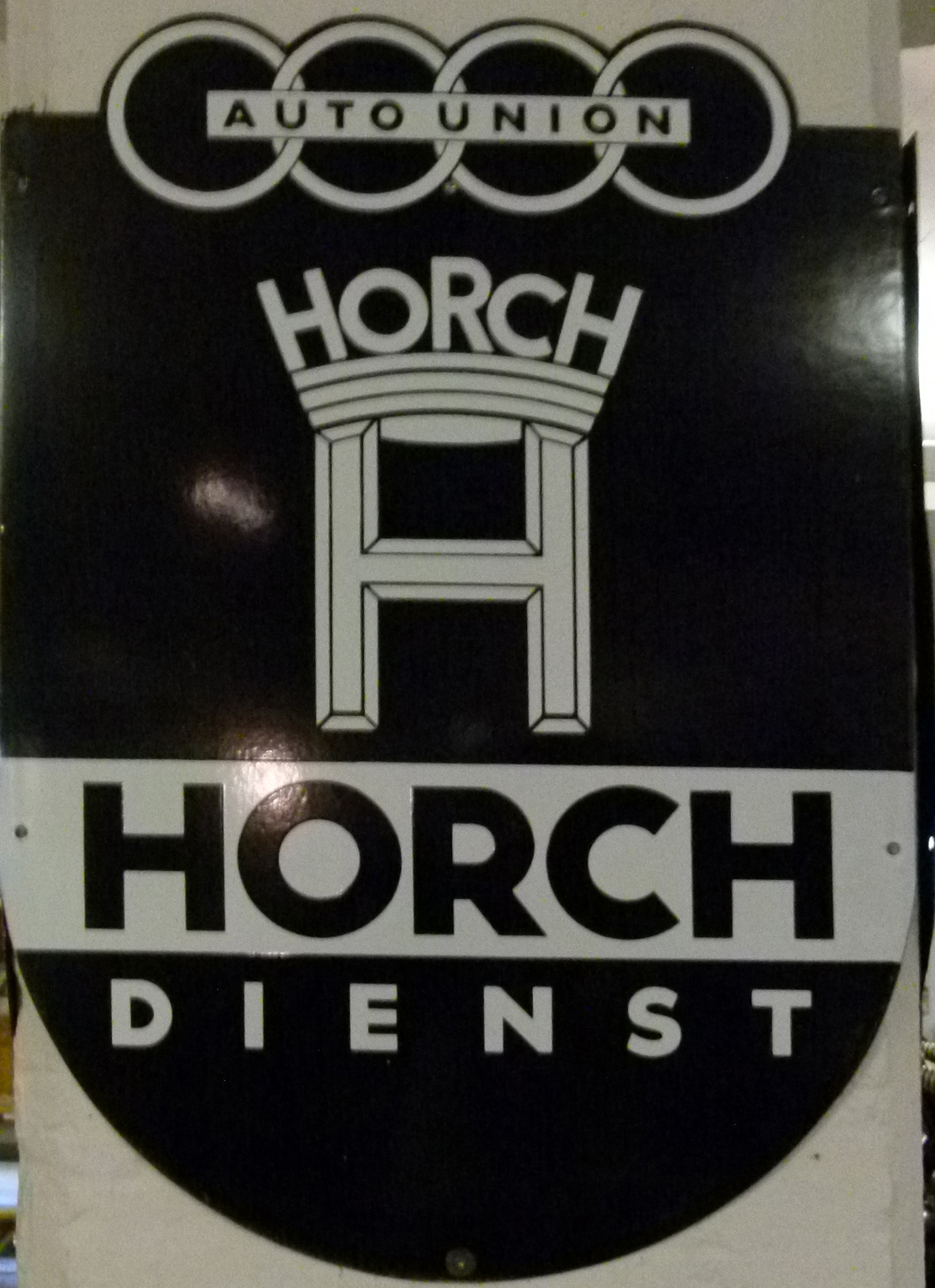 Originales Schild der Auto-Union: Horch Dienst